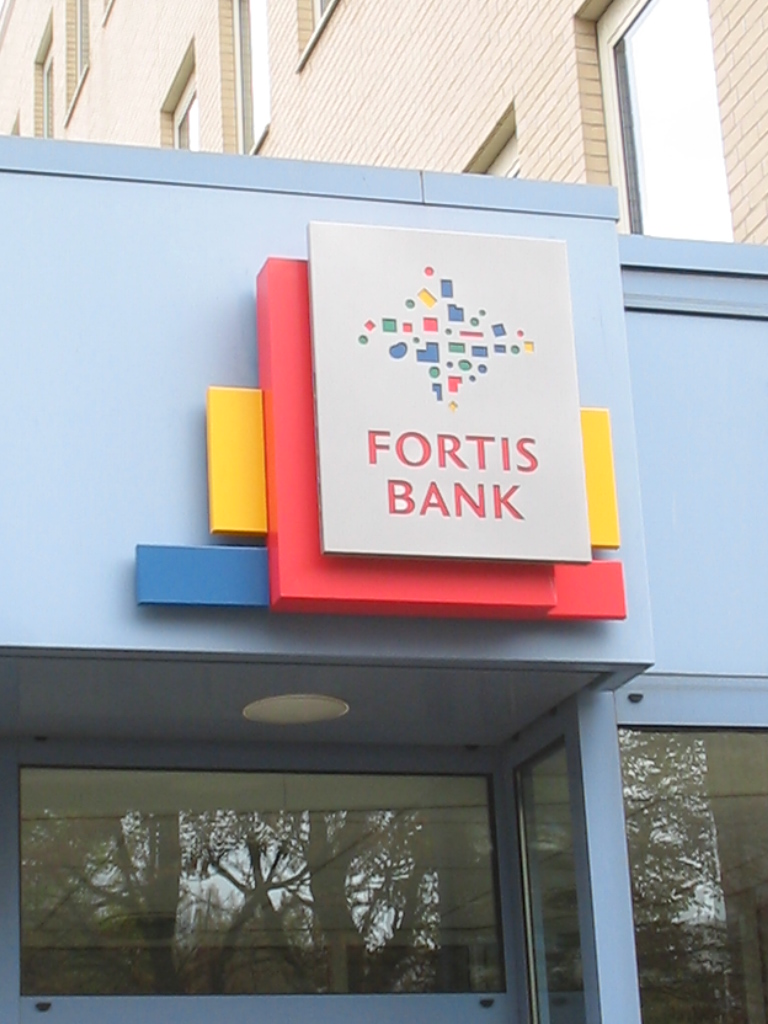 Fortis bank logo, Delft, oktober 2005